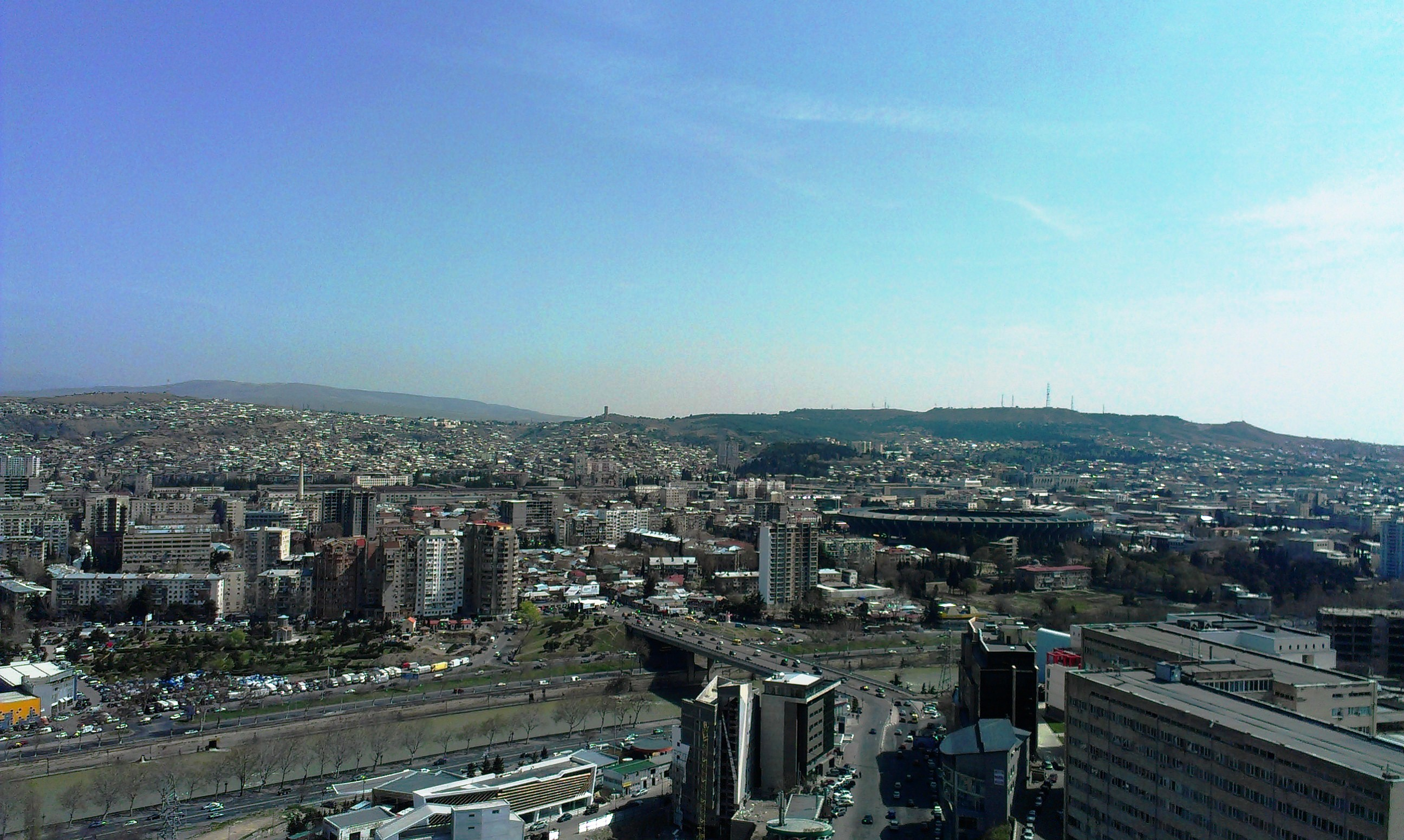 დიდუბის აღმოსავლეთ ნაწილი